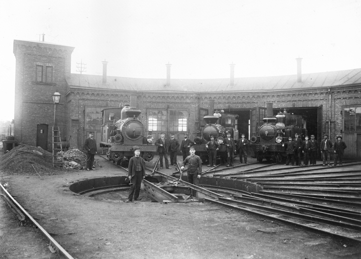 Fotografi i svart-vitt av Bredåkra-Tingsryds järnvägs lokstall i Ronneby med personal fotograferat år 1897.